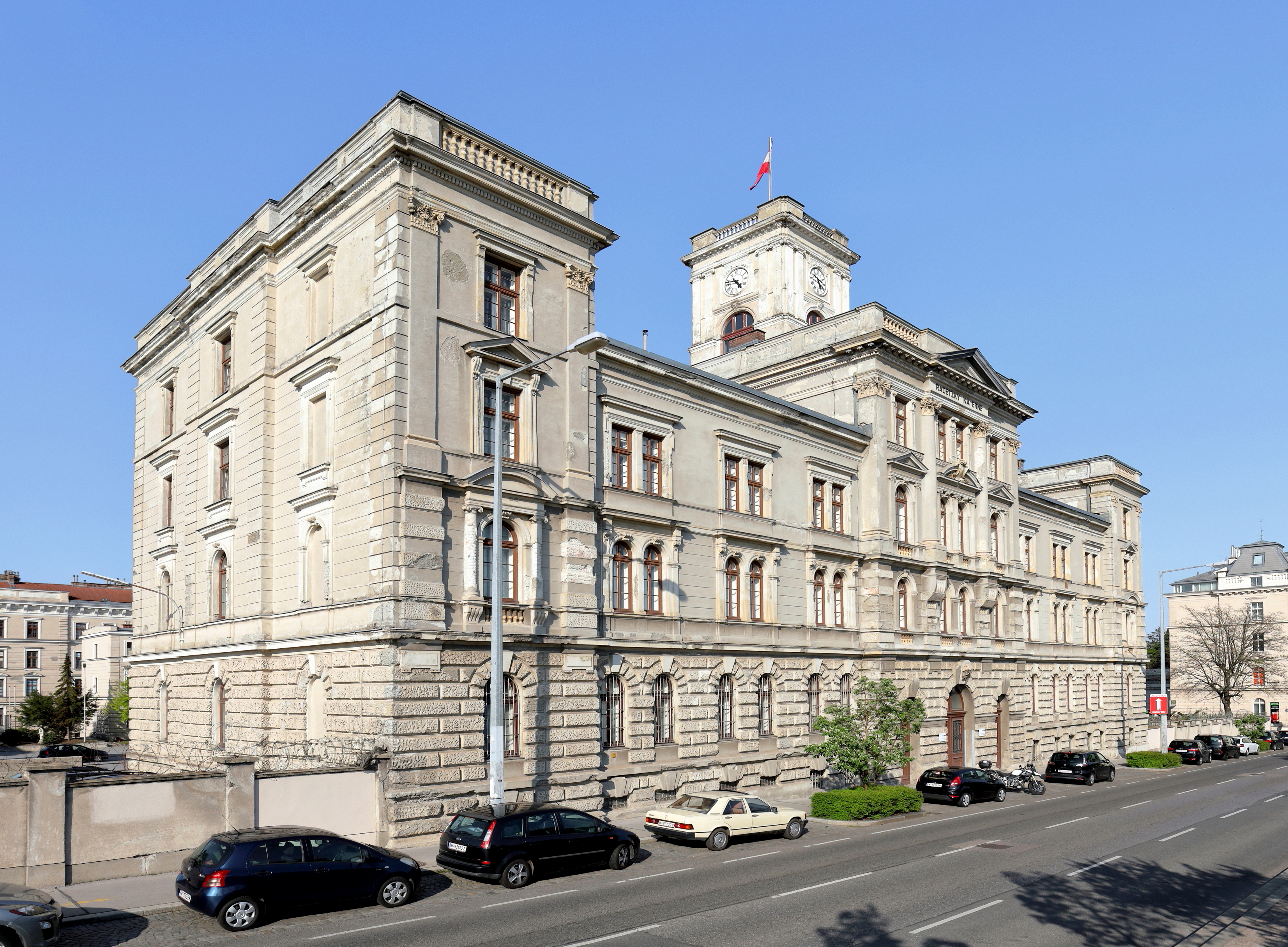 Das Stabsgebäude der Graf-Radetzky-Kaserne im 16. Wiener Gemeindebezirk Ottakring.Die Kaserne wurde im Zuge der Kasernentransaktion auf einem Areal von über 15.000 m² von 1894 bis 1896 als Graf-Radetzky-Infanteriekaserne auf der Schmelz errichtet und ist seit 1980 Sitz des Militärkommandos Wien.